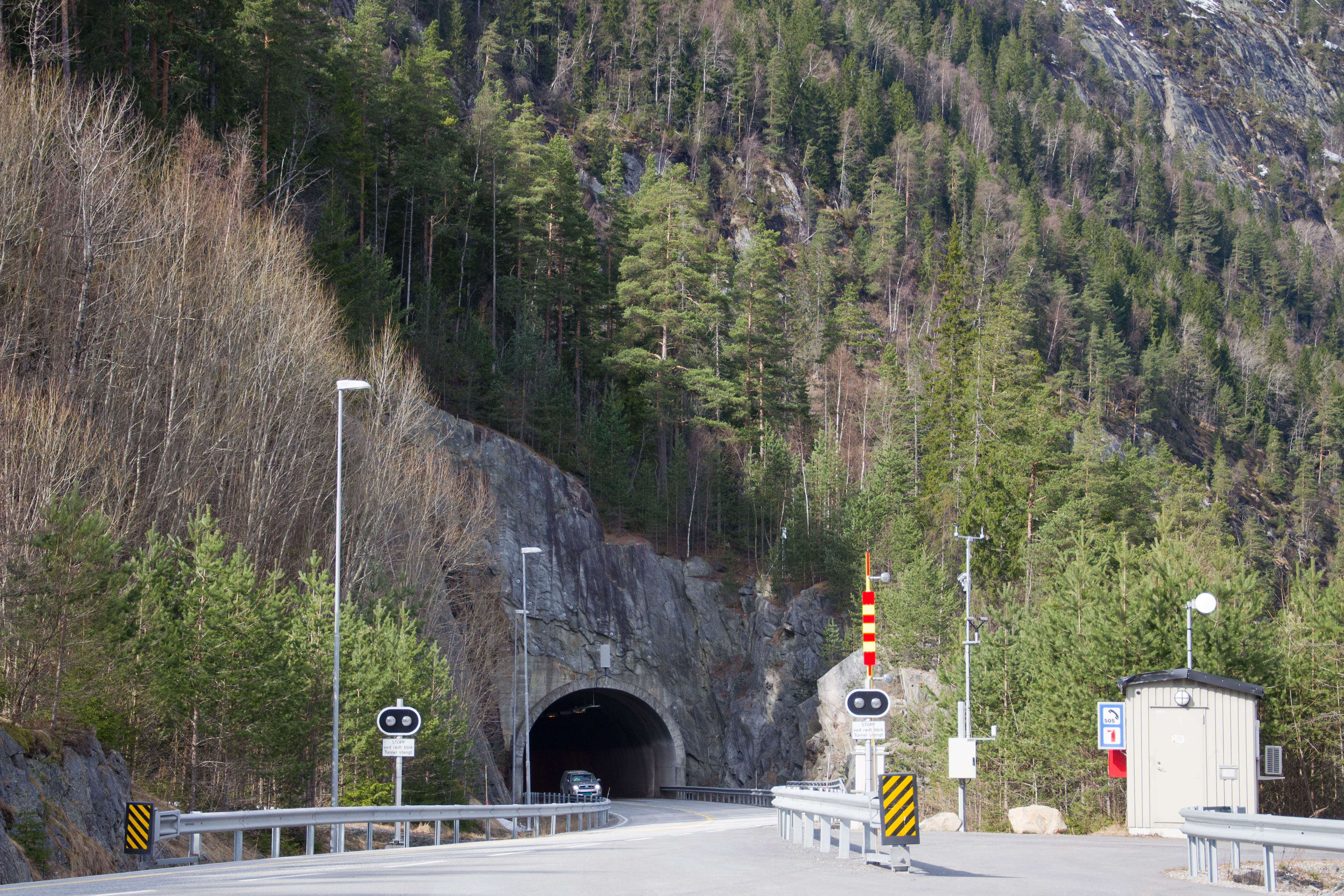 Jønjiljotunnelen på fylkesvei 37 i Notodden